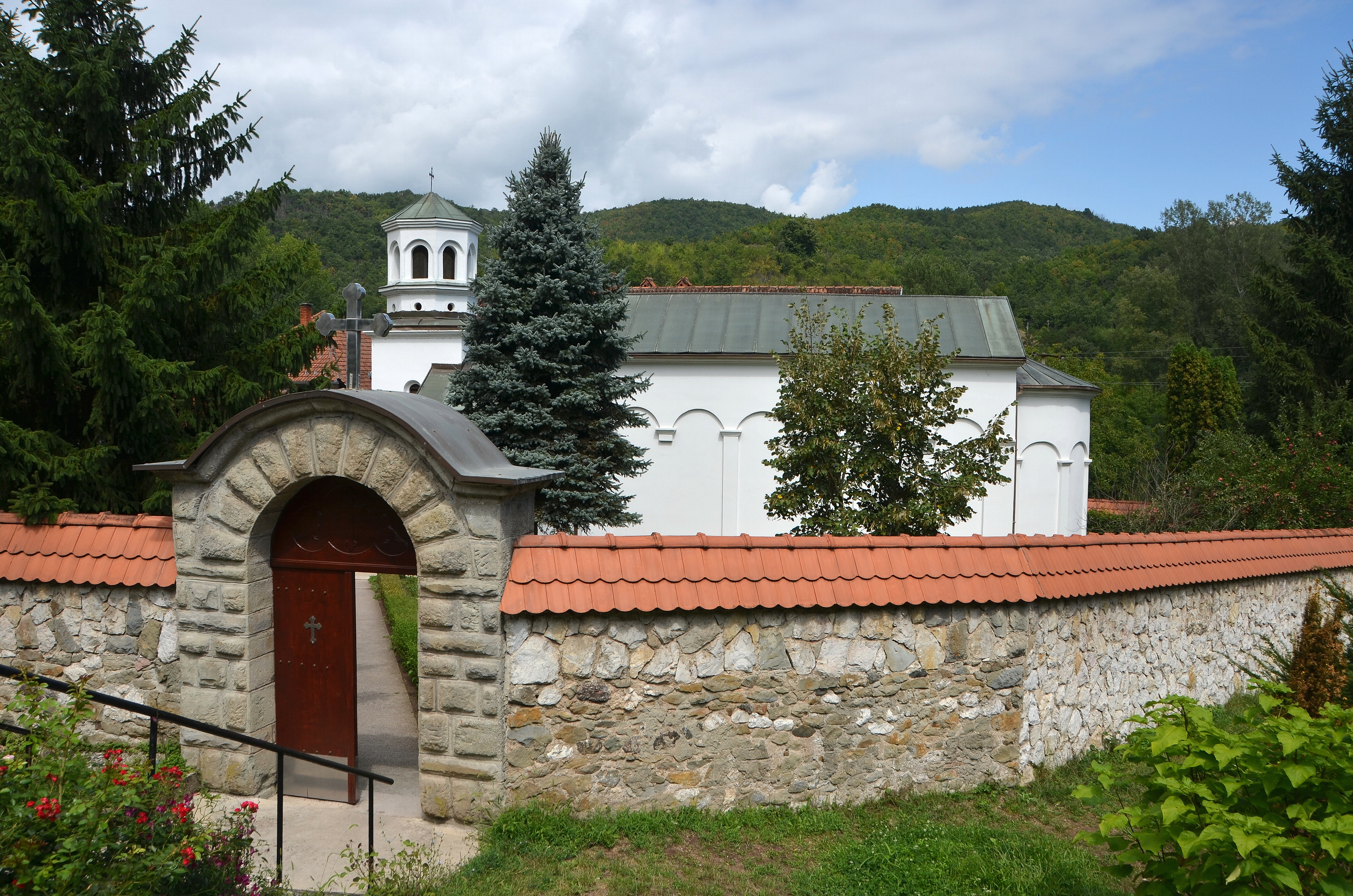 Свој данашњи изглед, са зиданом припратом и звоником, храм је добио је 1930. године.